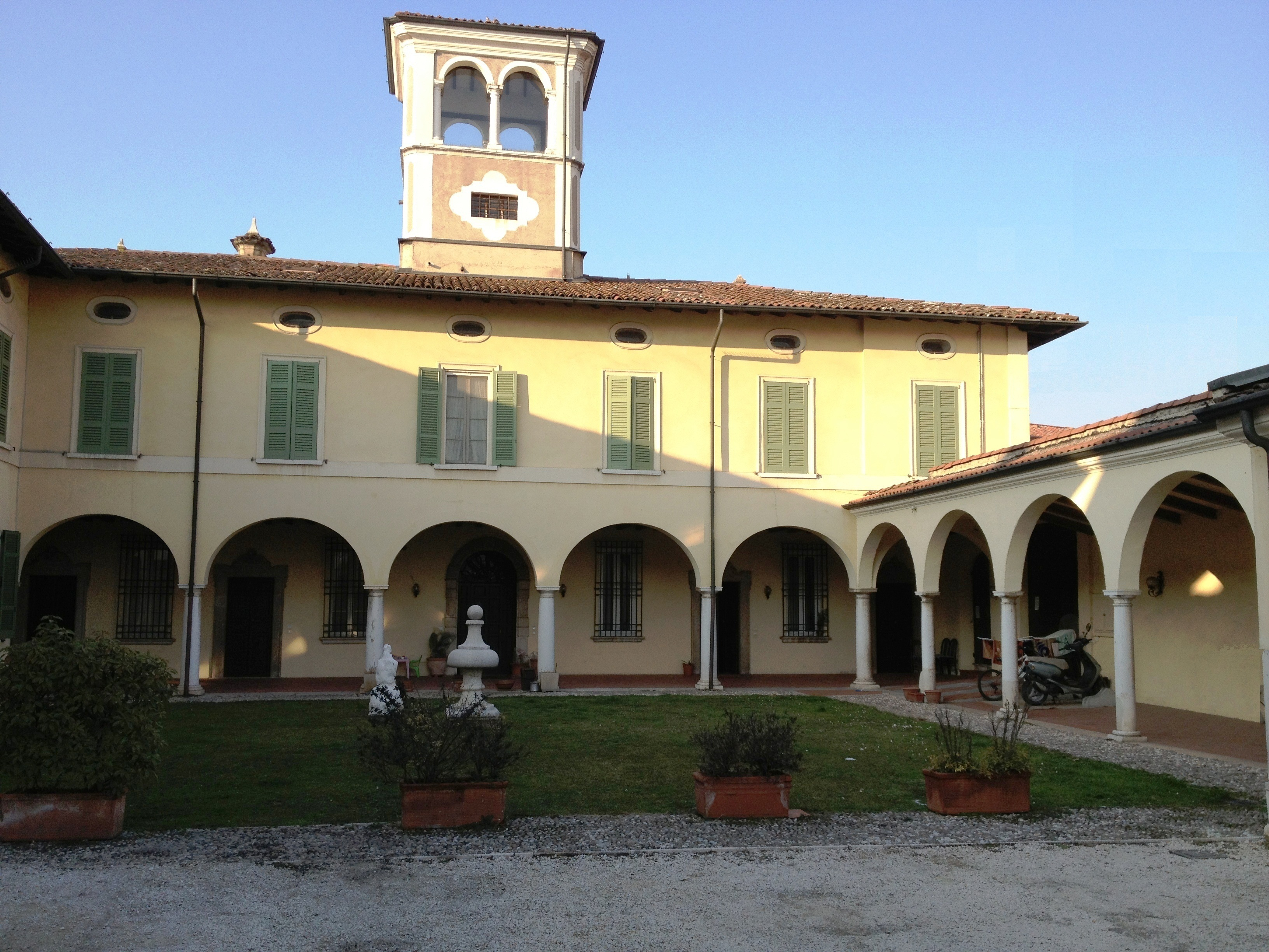 interno Palazzo Mondella-GHEDI(Brescia)